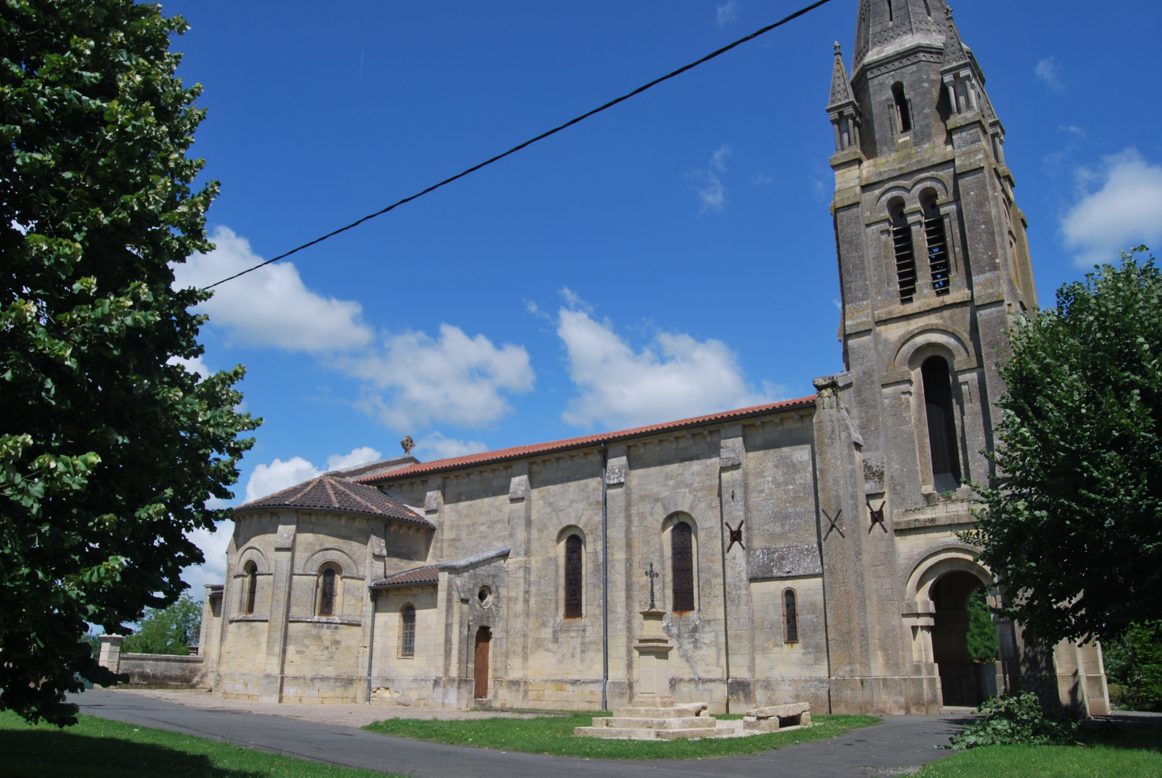 Église Saint-Michel de Civrac-sur-Dordogne